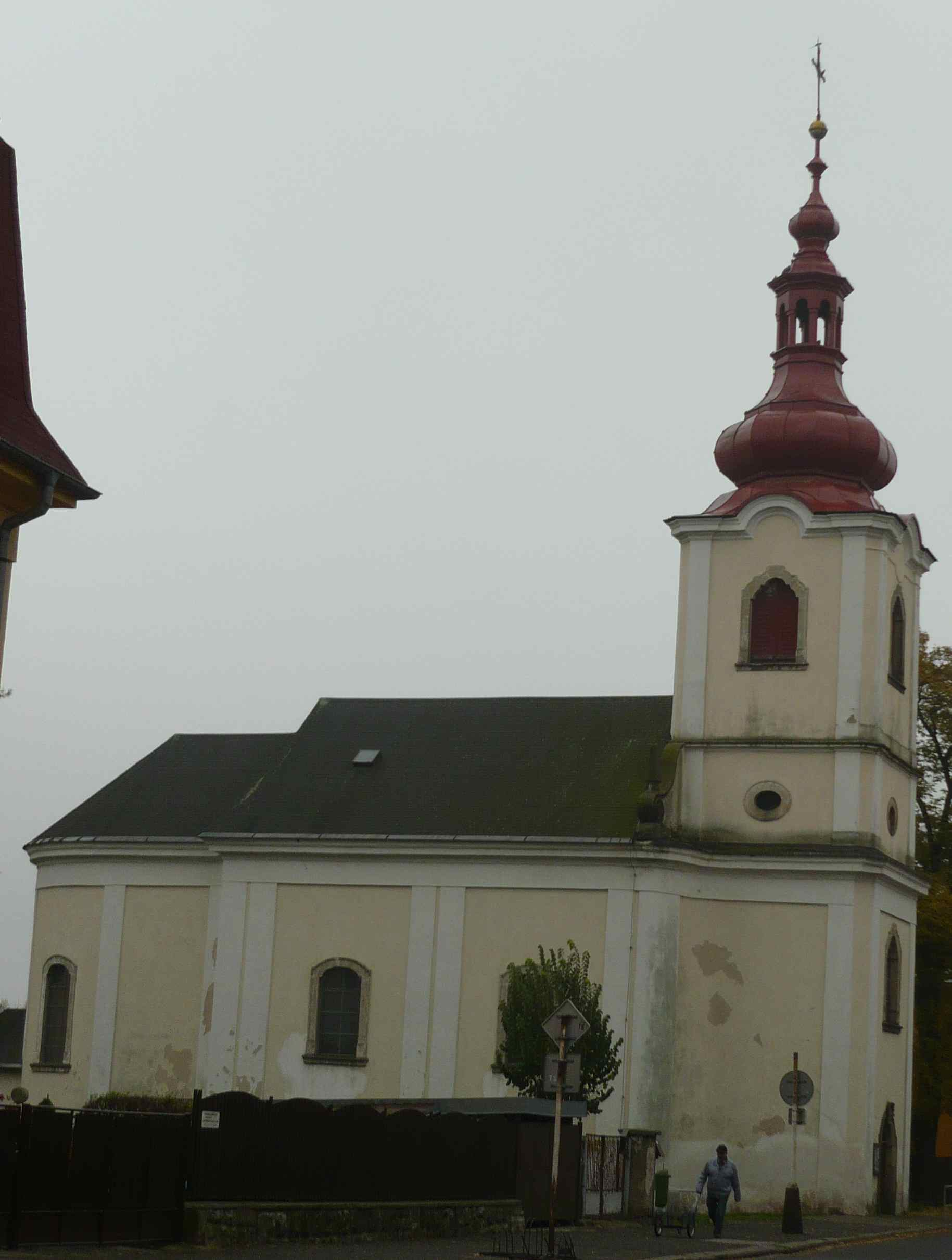 Kostel Povýšení svatého Kříže (Dvůr Králové nad Labem), Riegrova, Dvůr Králové nad Labem